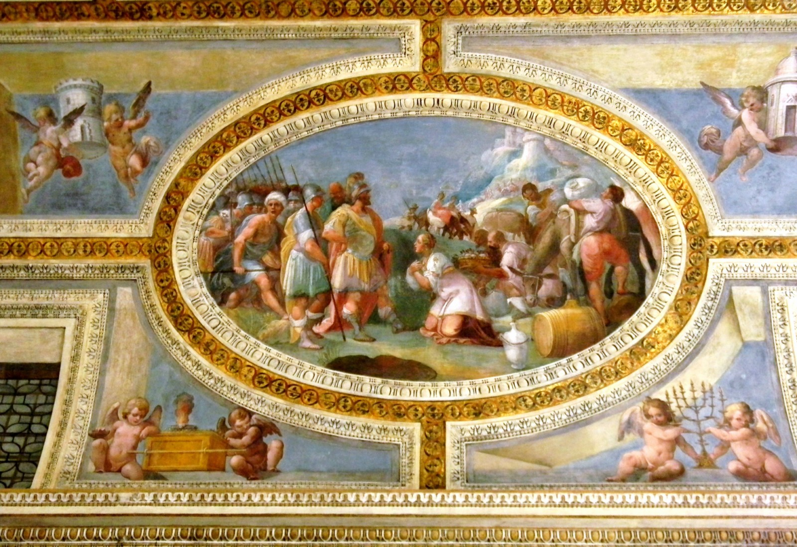 Scene dal Vecchio Testamento. Affreschi di Belisario Corenzio.